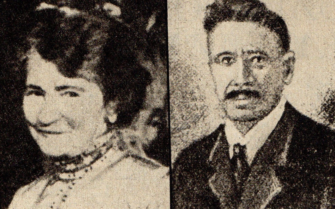 Teodora i Izydor Gulgowscy.